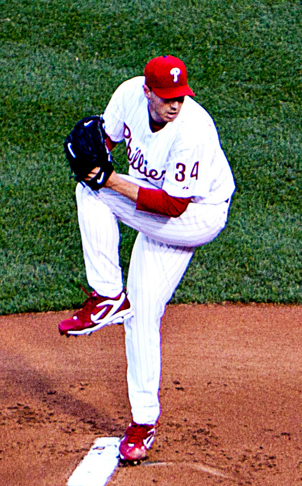 Roy Halladay